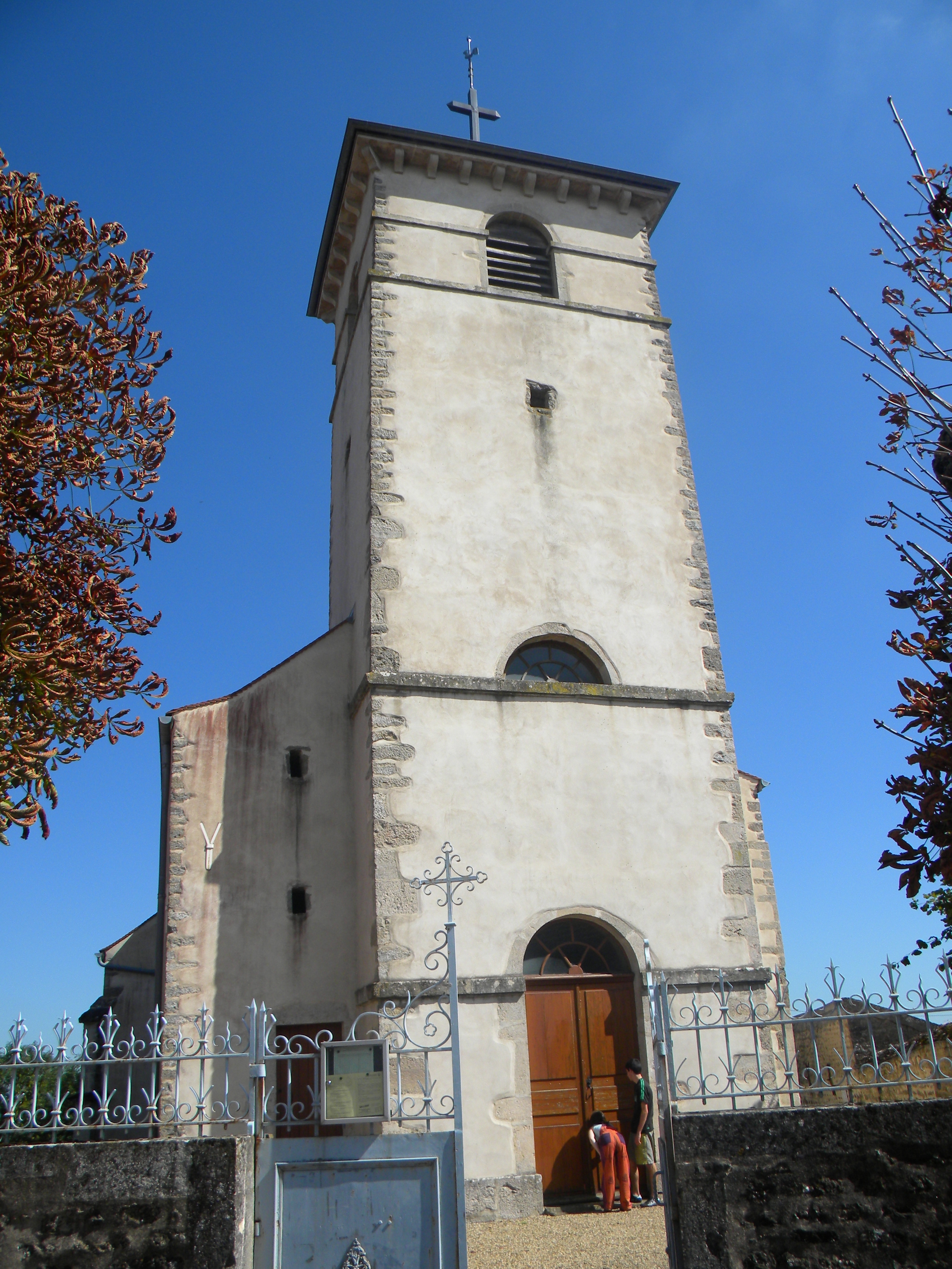 Mavilly-Mandelo, l'église de Mavilly